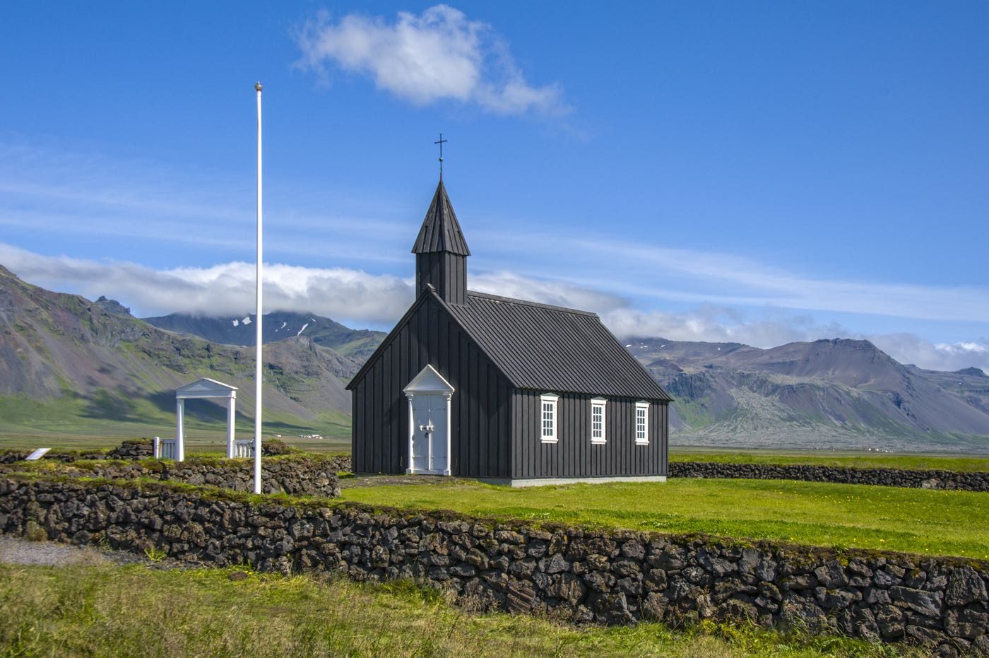 Búðakirkja